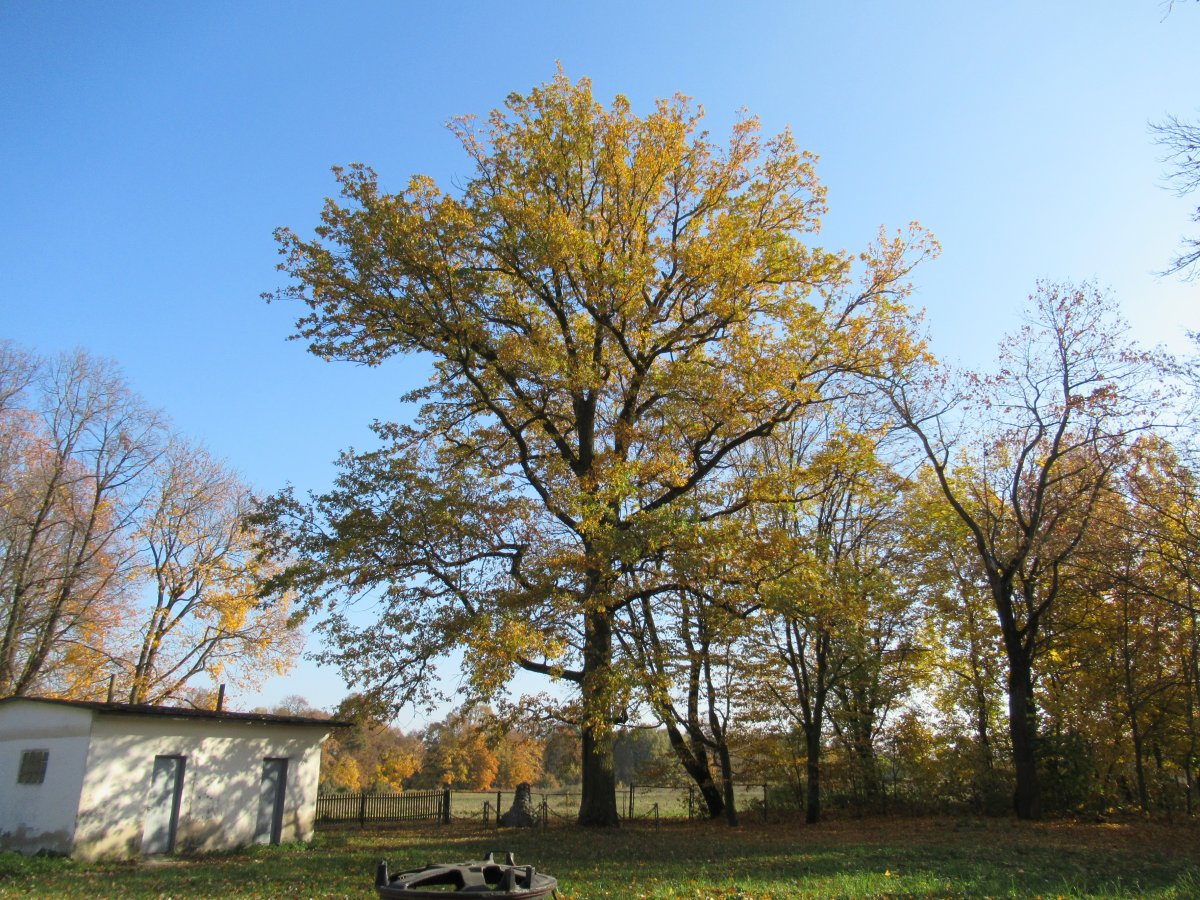 Флер’янова. Дуб Элізы Ажэшкі